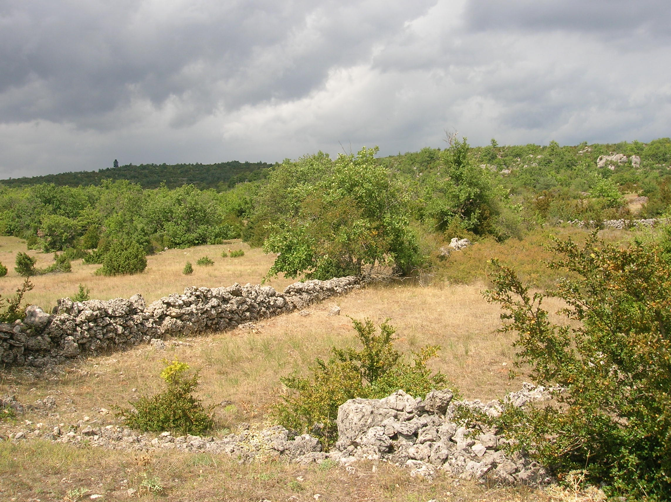 Cliché d'un photographe amateur près de La Couvertoirade sur le Plateau du Larzac.